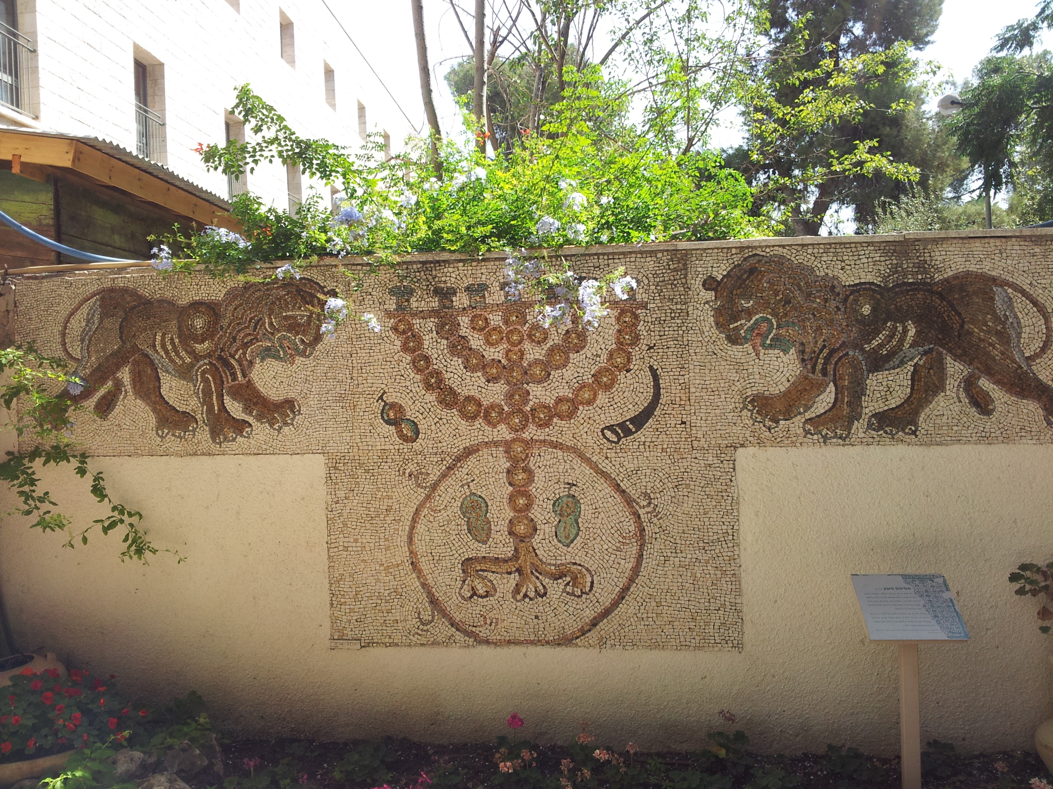 העתק פסיפס מעון במתחם יד יצחק בן צבי בירושלים